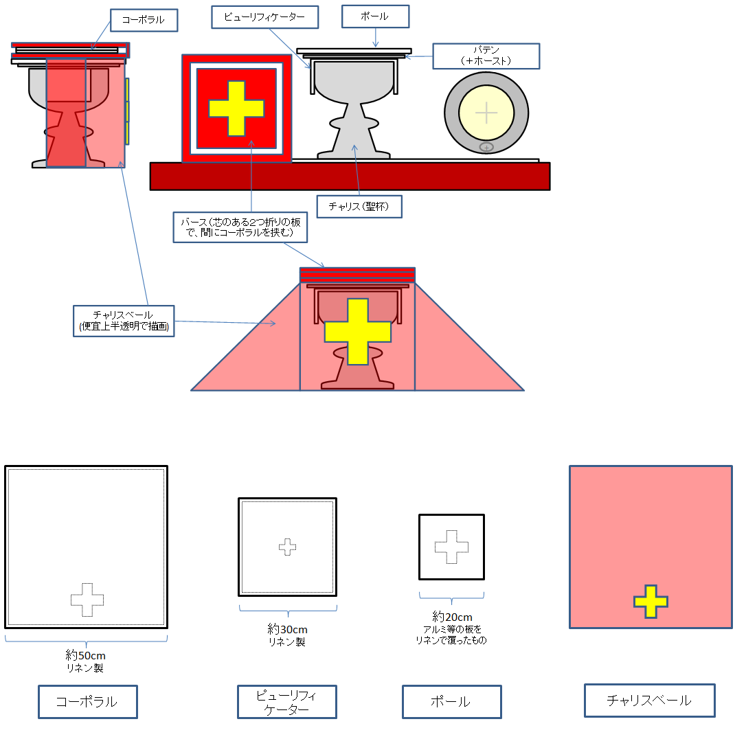 日本聖公会の聖餐式で使用される祭具であるチャリスの説明図